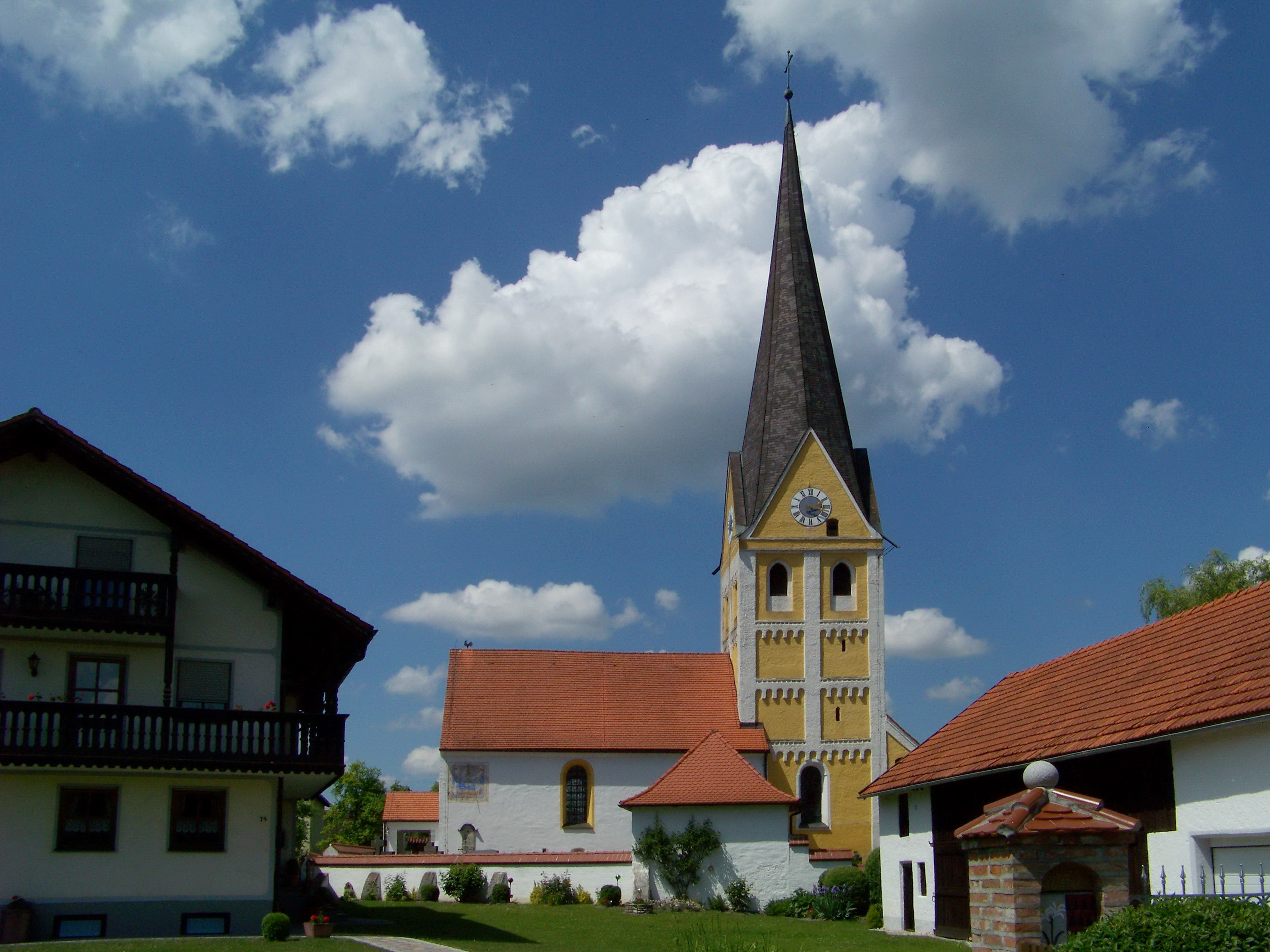 Landshut, Münchnerau, Kath. Kirche St. Petrus; spätromanischer Chorturmbau, 12./13. Jh.; mit Ausstattung; Ehem. Seelenhaus, jetzt Leichenhaus, um 1730.